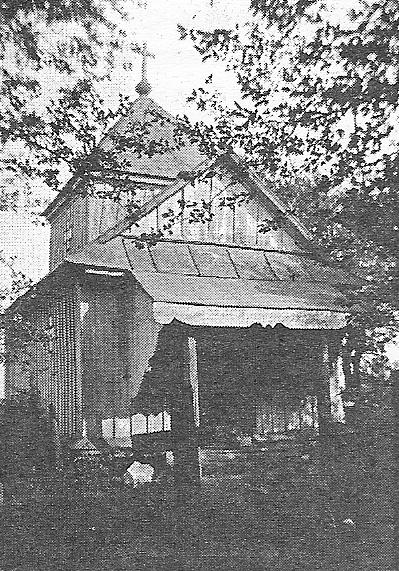 Каплиця родини Річинських. Село Тетильківці нинішнього Шумського району Тернопільської області.